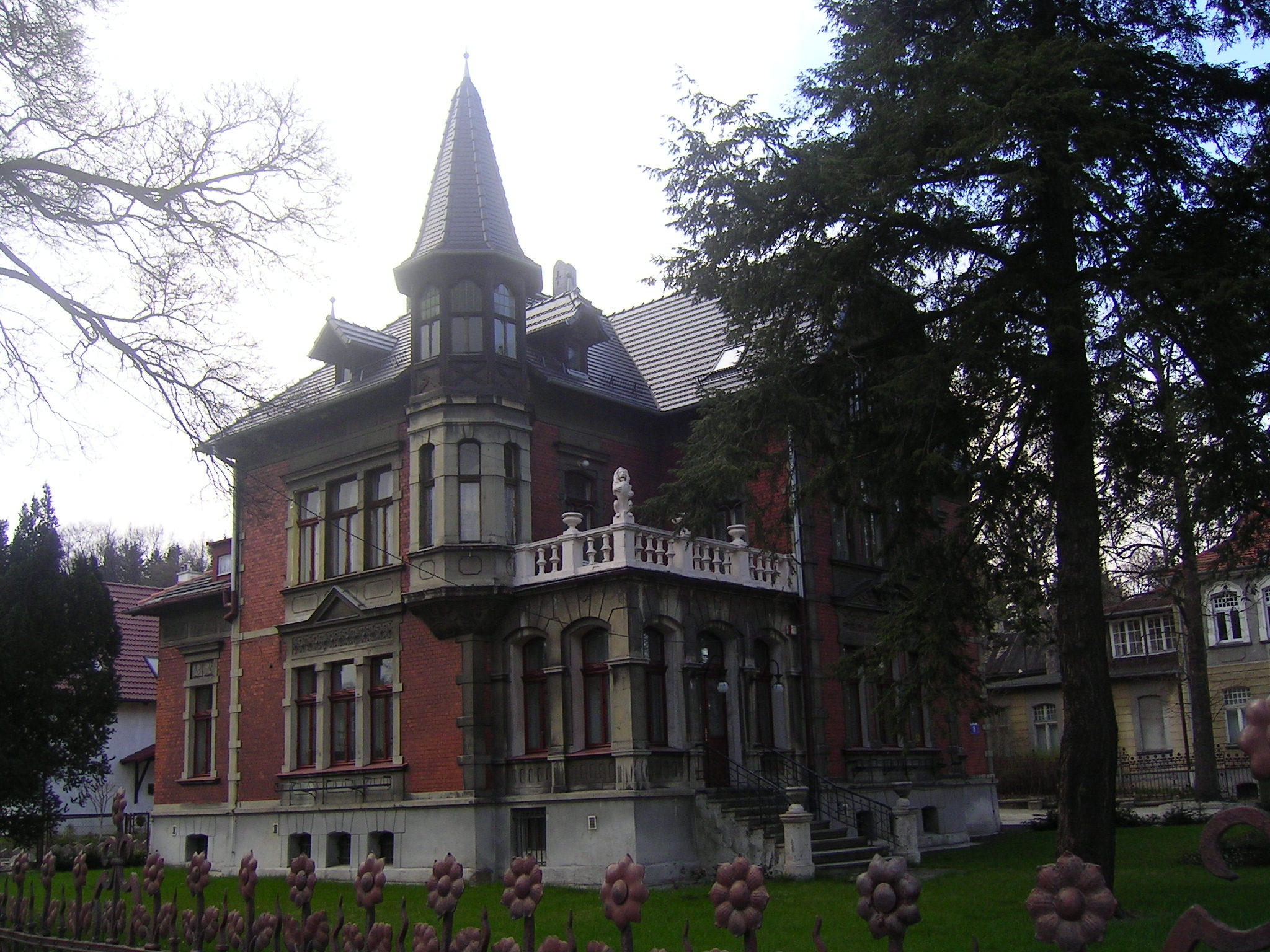 Budynek poczty w Szczawnie-Zdroju to ten ledwie widoczny na drugim planie. Ten w centrum kadru (ul. Kolejowa 8) był częścią Szkoły Podstawowej nr 2, aktualnie znajdują się tam pomieszczenia biurowe Summary autor: Radwa biuowe a takze 3 lokale mieszkalne